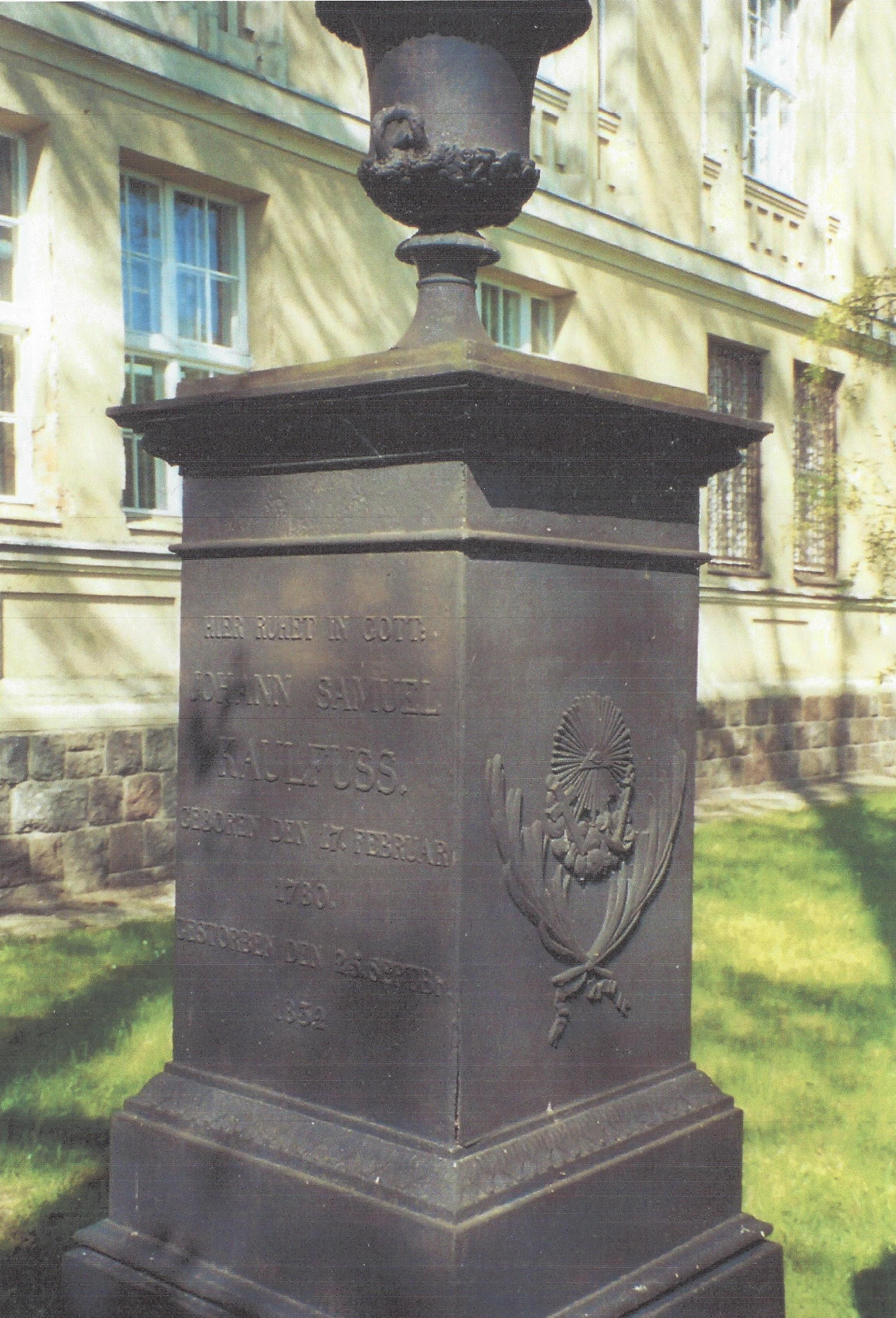 Denkmal für Johann Samuel Kaulfuß vor der Fürstin-Elisabeth-Schule (der früheren Fürstin-Hedwig-Schule in Szczecinek.